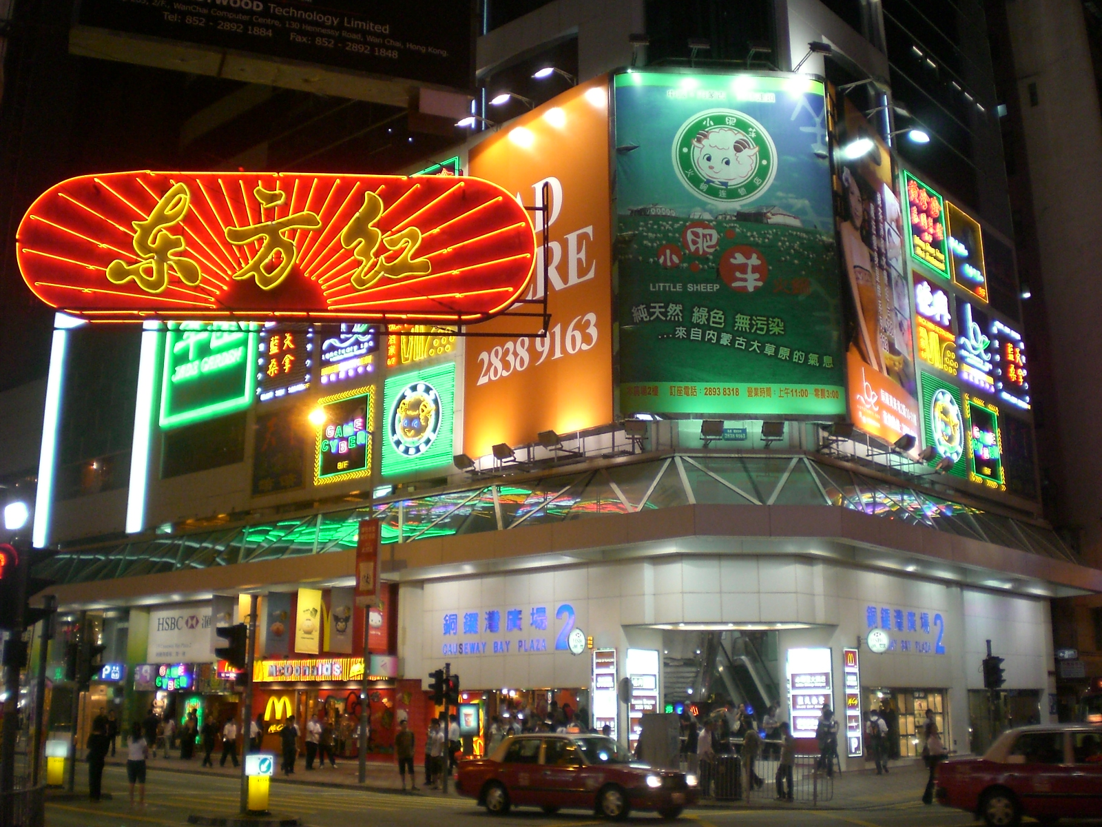 香港島銅鑼灣廣場2期, 小肥羊餐飲連鎖有限公司, 東方紅藥業有限公司